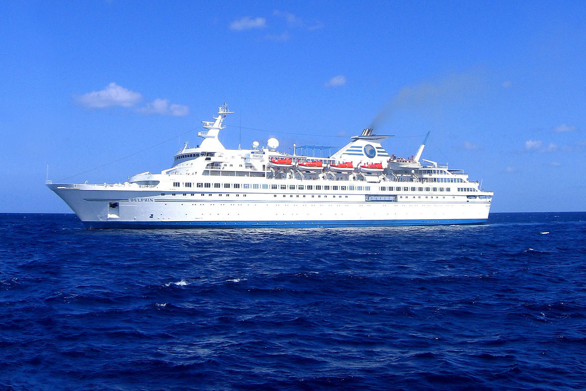 The MS Delphin 2006 in Mexico. I worked from 2005 to 2008 on this beautiful cruise ship as video operator and photo manager